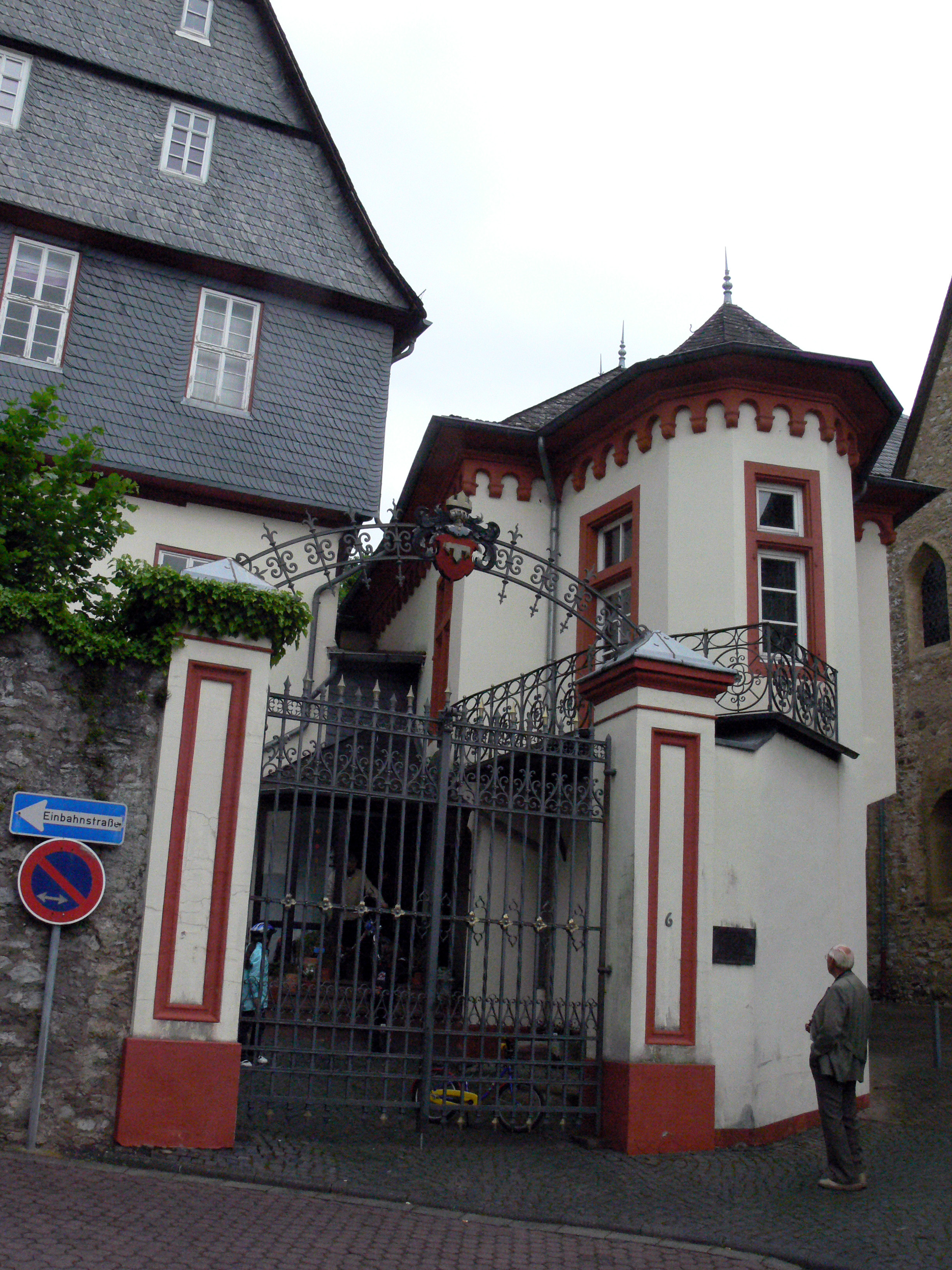 Niederadeliges Haus in Diez. Um 1250 als Burgsitz der Adligen von Diez errichtet und 1480 in seine jetzige Form gebracht. Um 1588 Anbau des seitlichen Pavillons mit Ehewappen des Junkers Walther von Diez. Danach Burgsitz der Klüppel von Elkershausen. Ab 1600 Eigentum der Grafen von der Leyen. 1719 von Kammerrat Johann Georg Eberhard erworben.